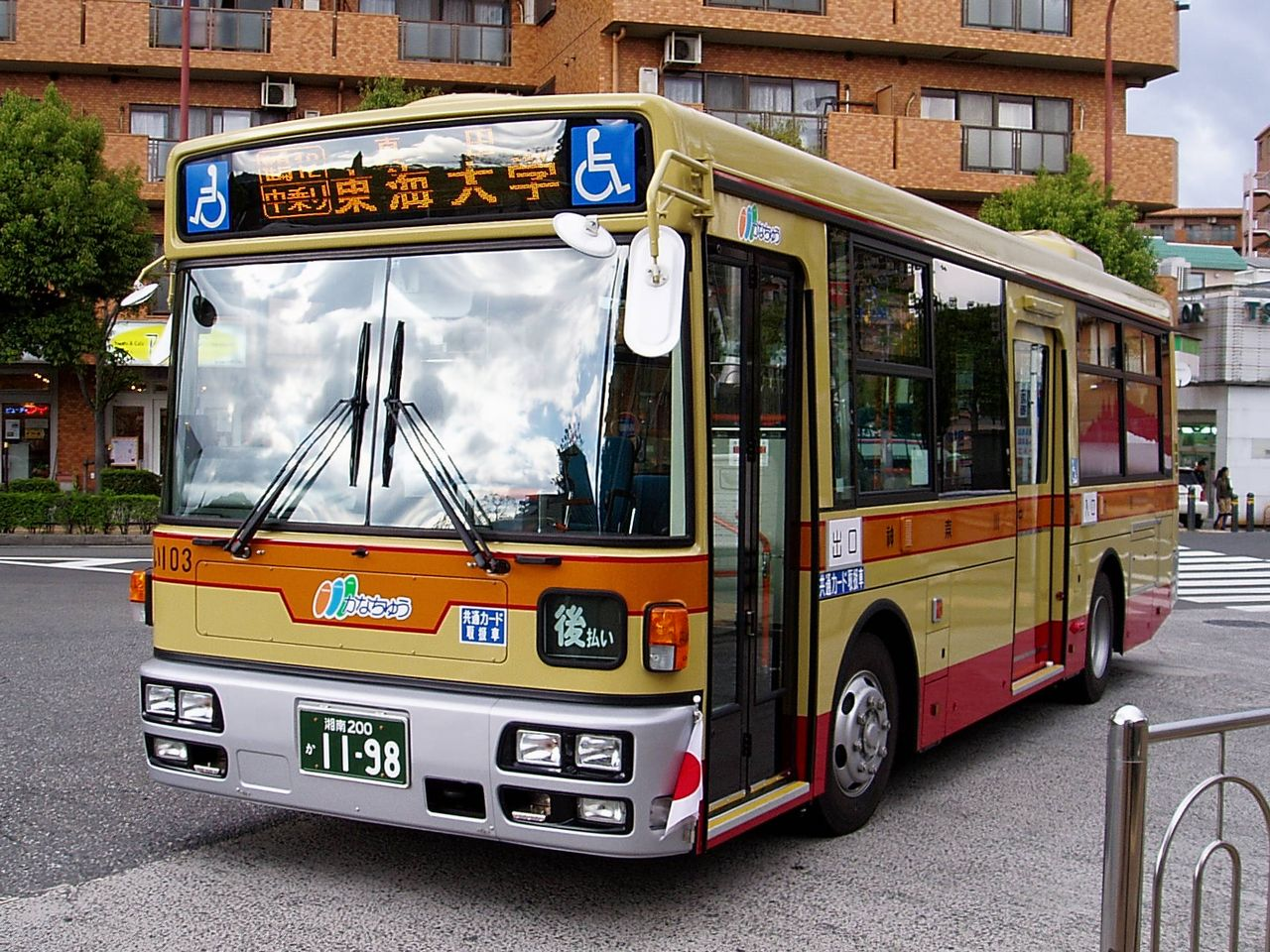 Kanagawa Chuo Kotsu I103（い103） Mitsubishi PDG-AR820GAN at Tsurumaki-onsen Sta.